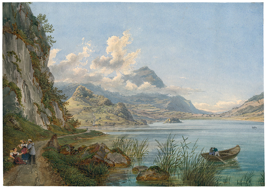 Ansicht des Rigibergs am Lauerzsee-Schwitz